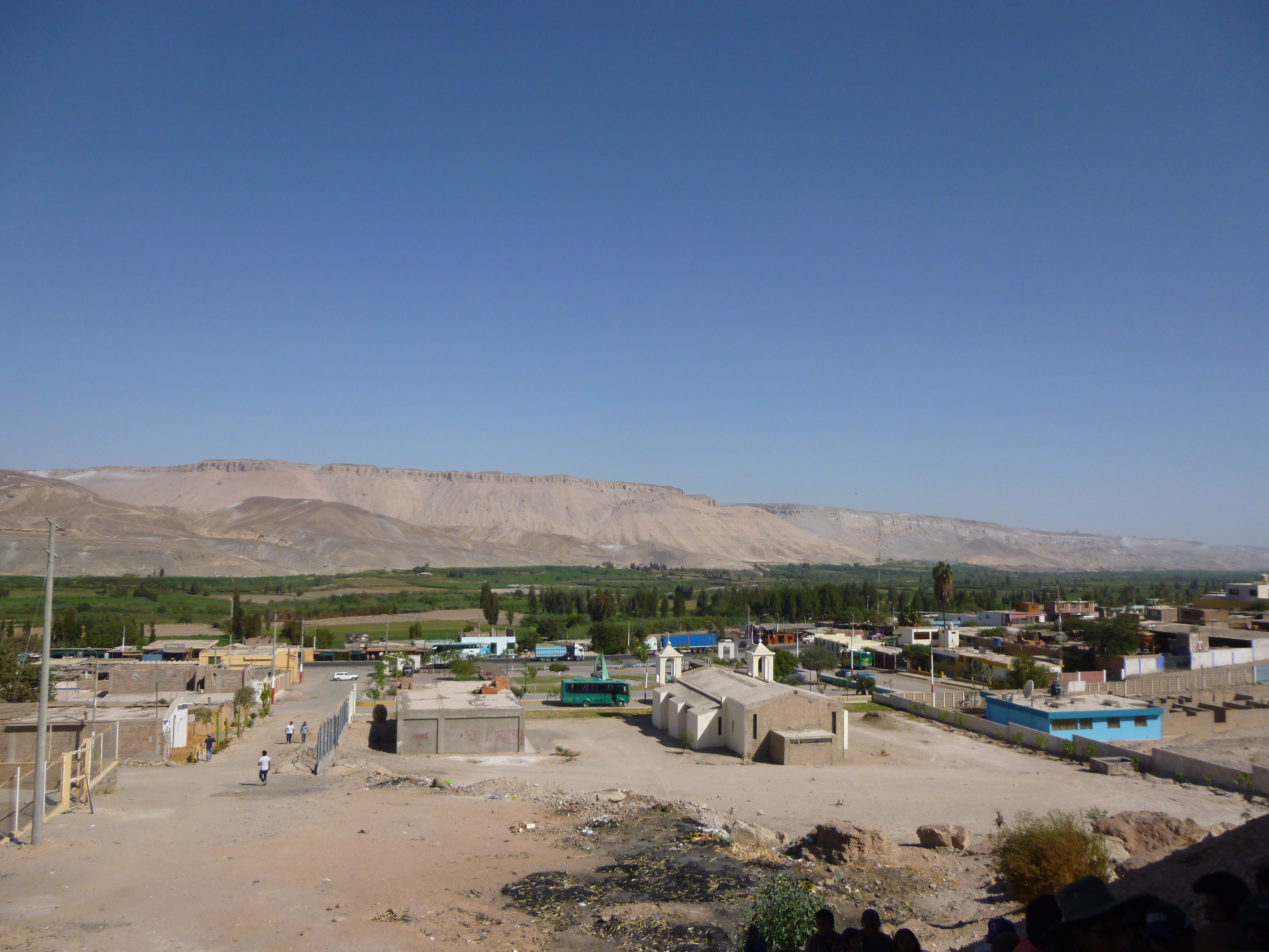 Plaza del Distrito de Vitor, Arequipa, Perú